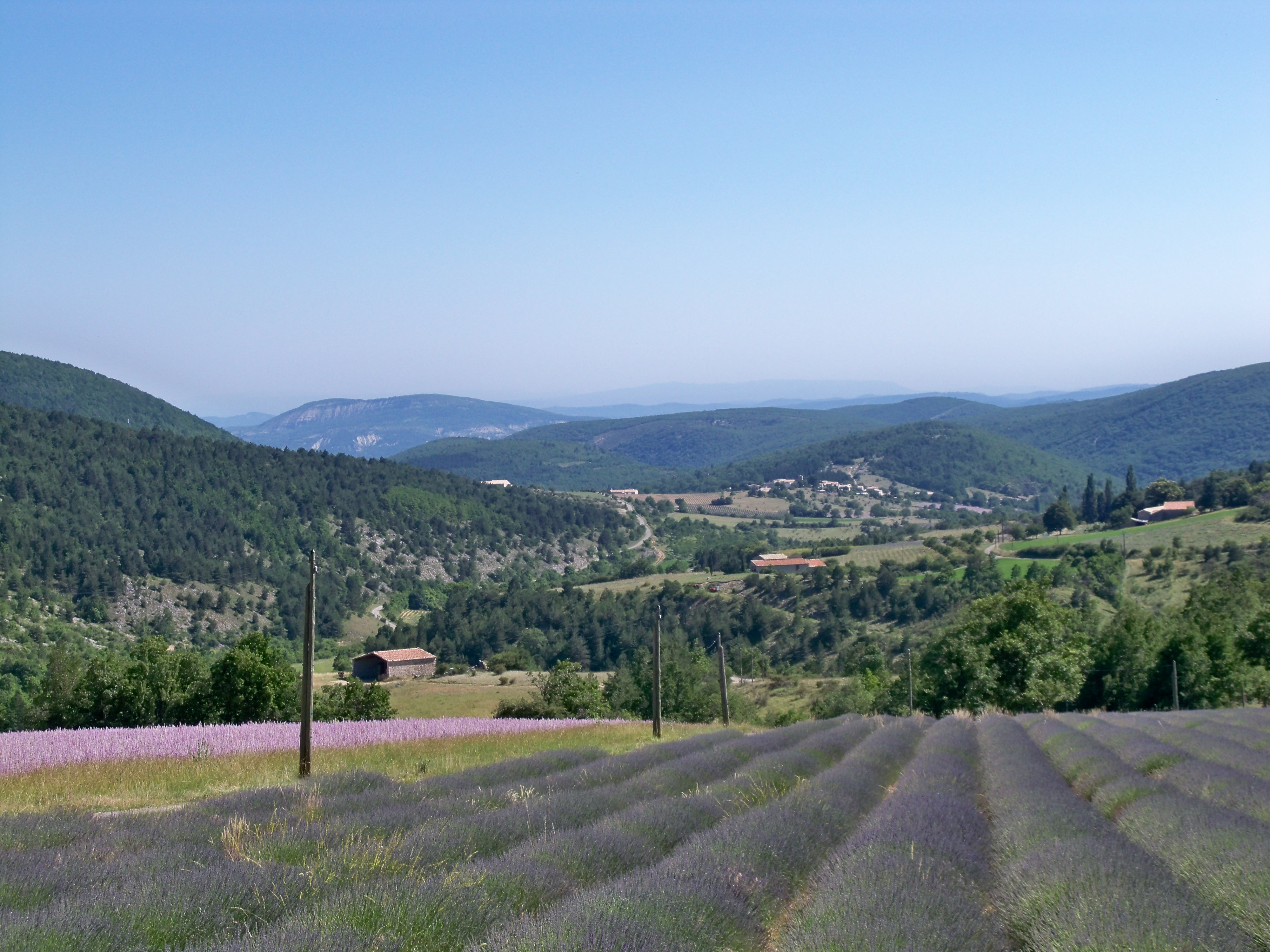 L'hospitalet (04), vu du hameau des Anglars